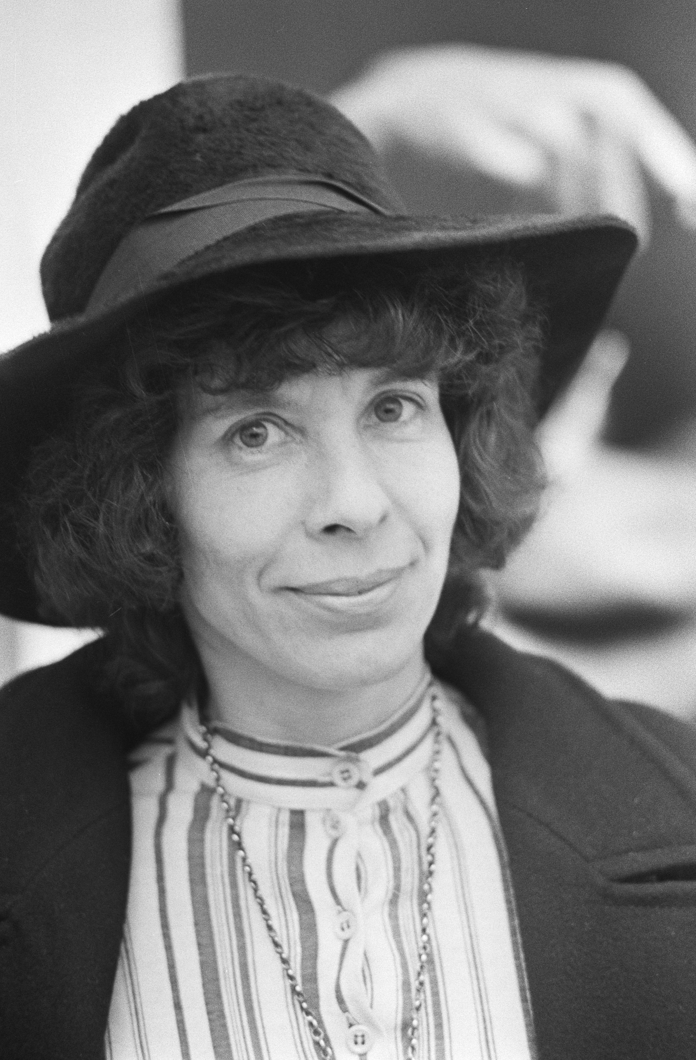 Renate Rubinstein, Tentoonstelling "Fotografen voor Vietnam" in Fodor te Amsterdam